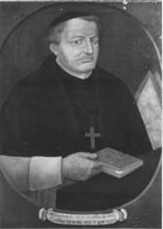 Obra da coleção Brasiliana Iconográfica.